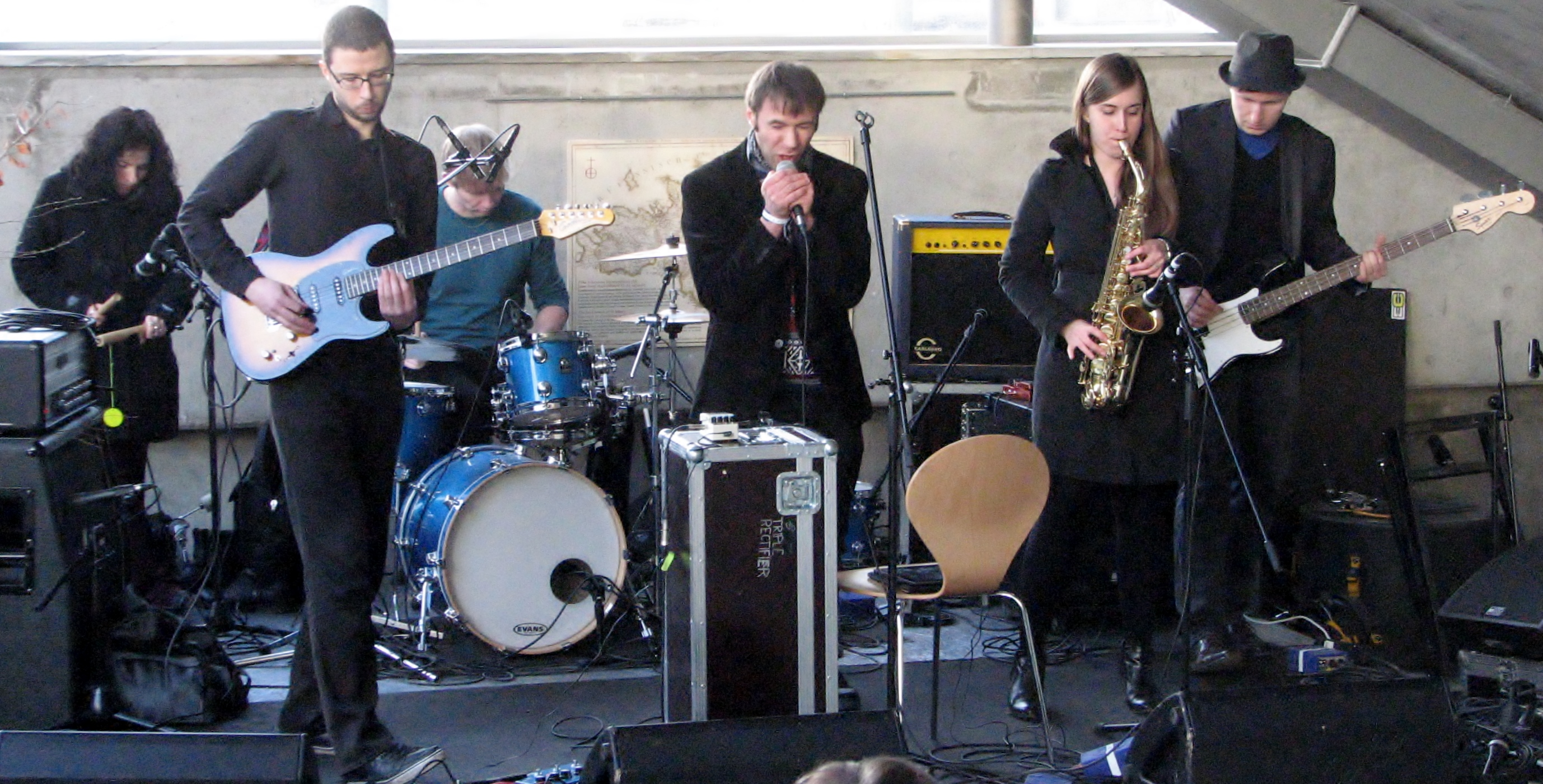 ansambel Kreatiivmootor esinemas Tallinn Music Weekil